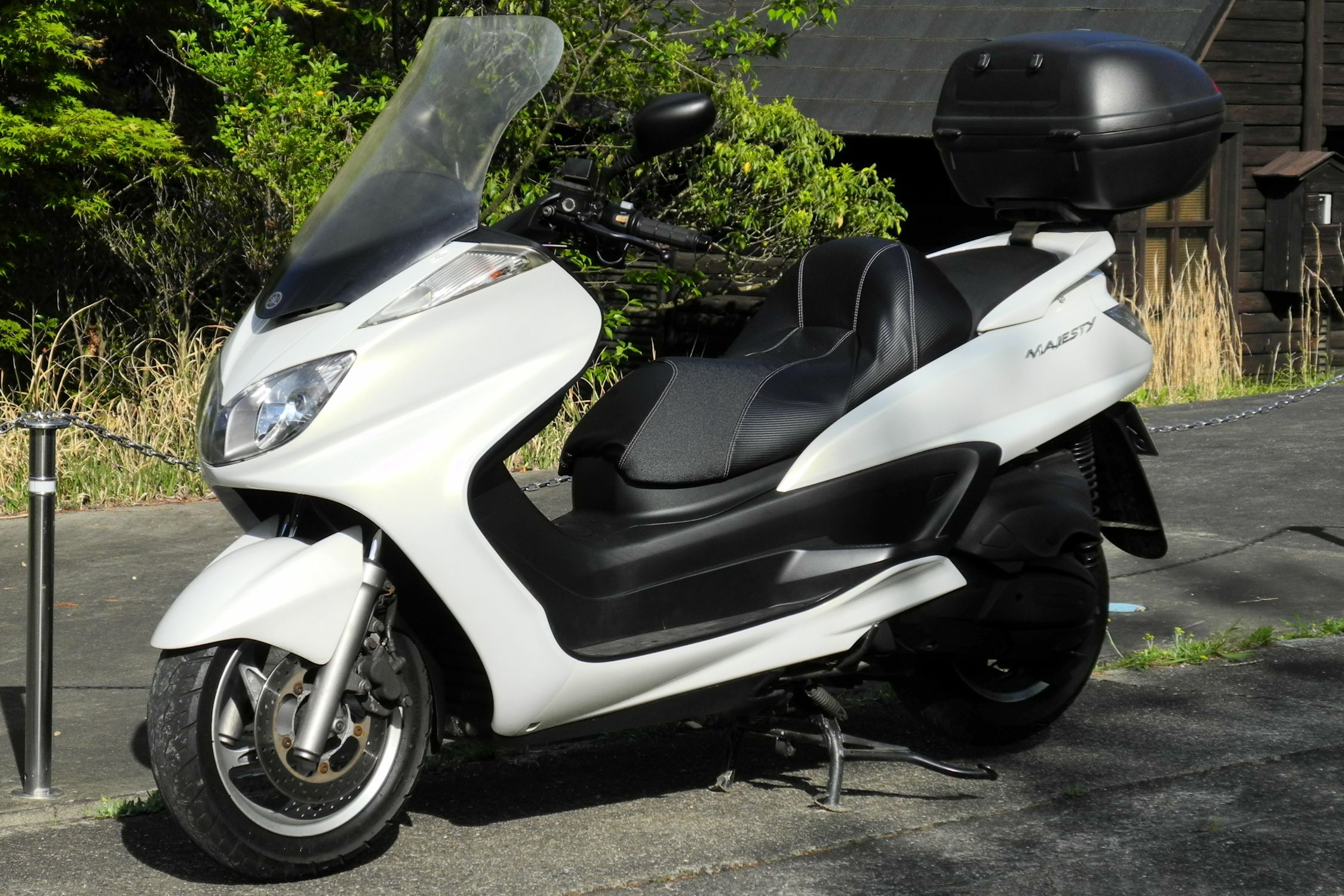 ヤマハ グランドマジェスティ(250cc) BA-SG15J 純正オプションのボックスキャリア（Q5K-YSK-037-E06）・オリジナルボックスE45（Q5K-YSK-001P27：GIVI E450同等品）を取付済、シート張替済、その他はほぼノーマル